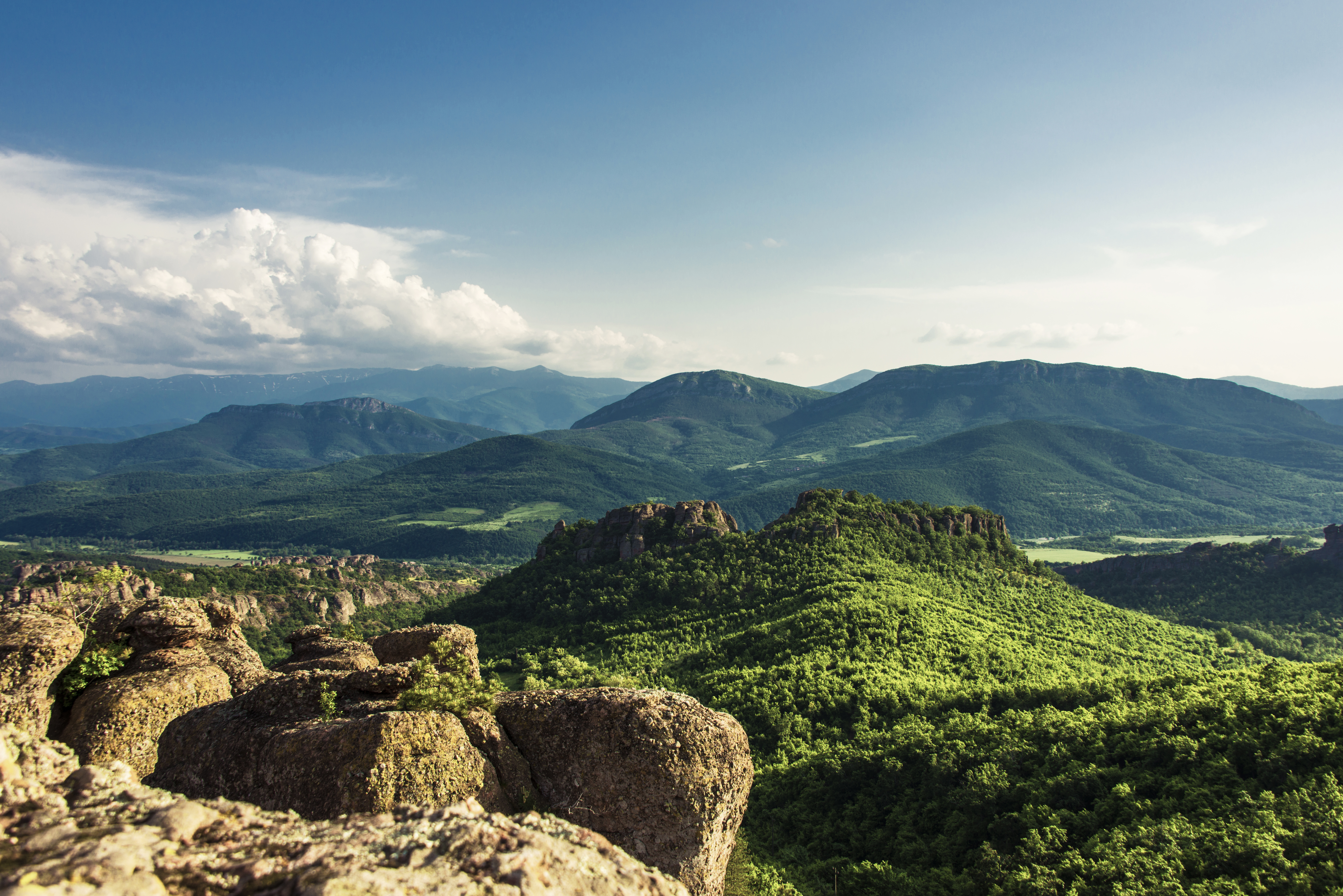 Западна Стара планина, изглед от Белоградчишките скали